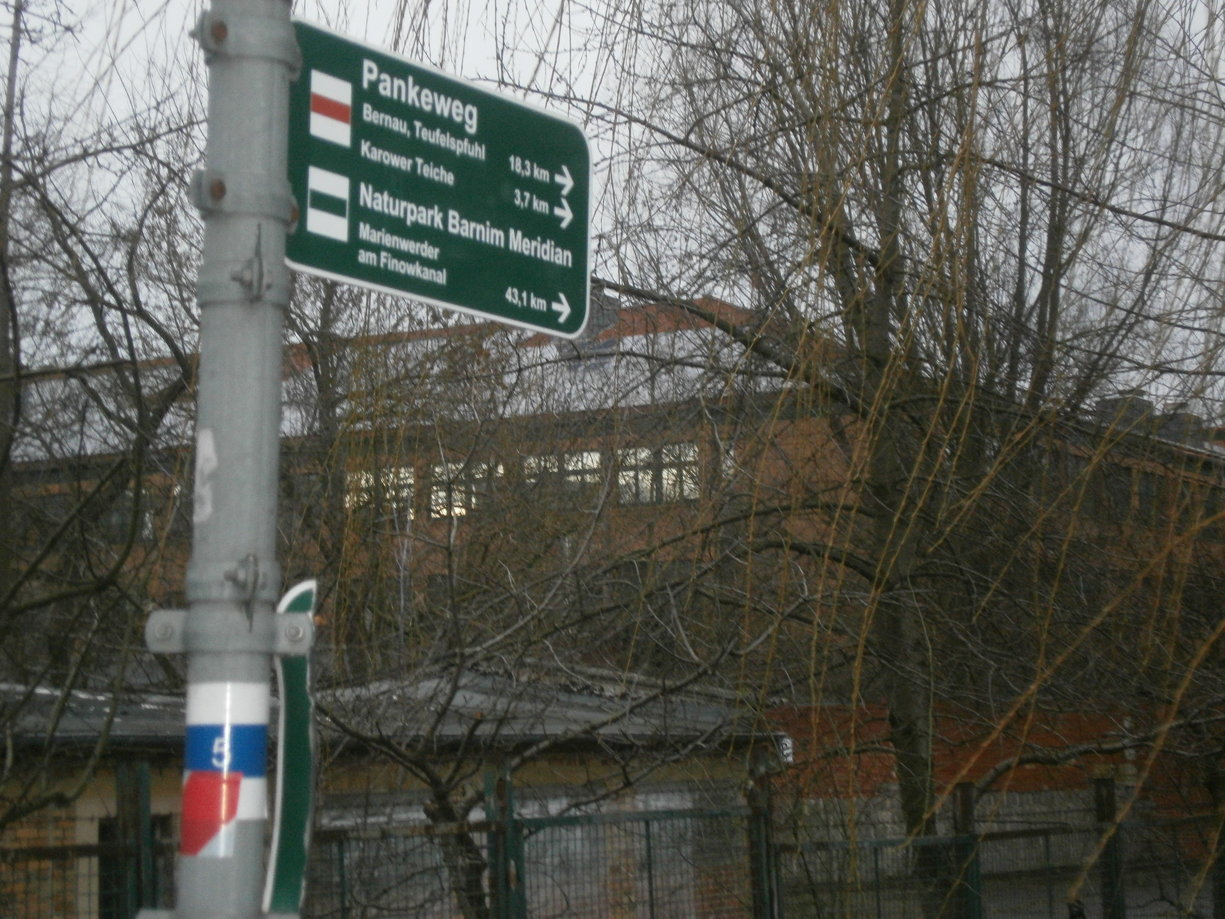 Der Grüne Hauptweg 5 in Berlin, benannt als Nord-Süd-Weg, verläuft als innerstädtischer Wanderweg in dieser Richtung durch Berlin, teilweise deckungsgleich mit dem Pankeweg einem Abschnitt des internationalen Fernwegs.